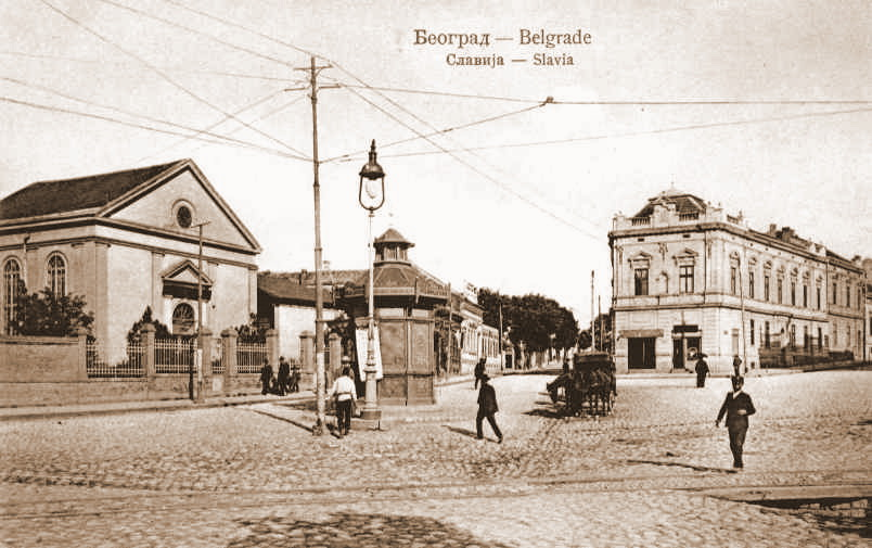 Trg Slavija u Beogradu